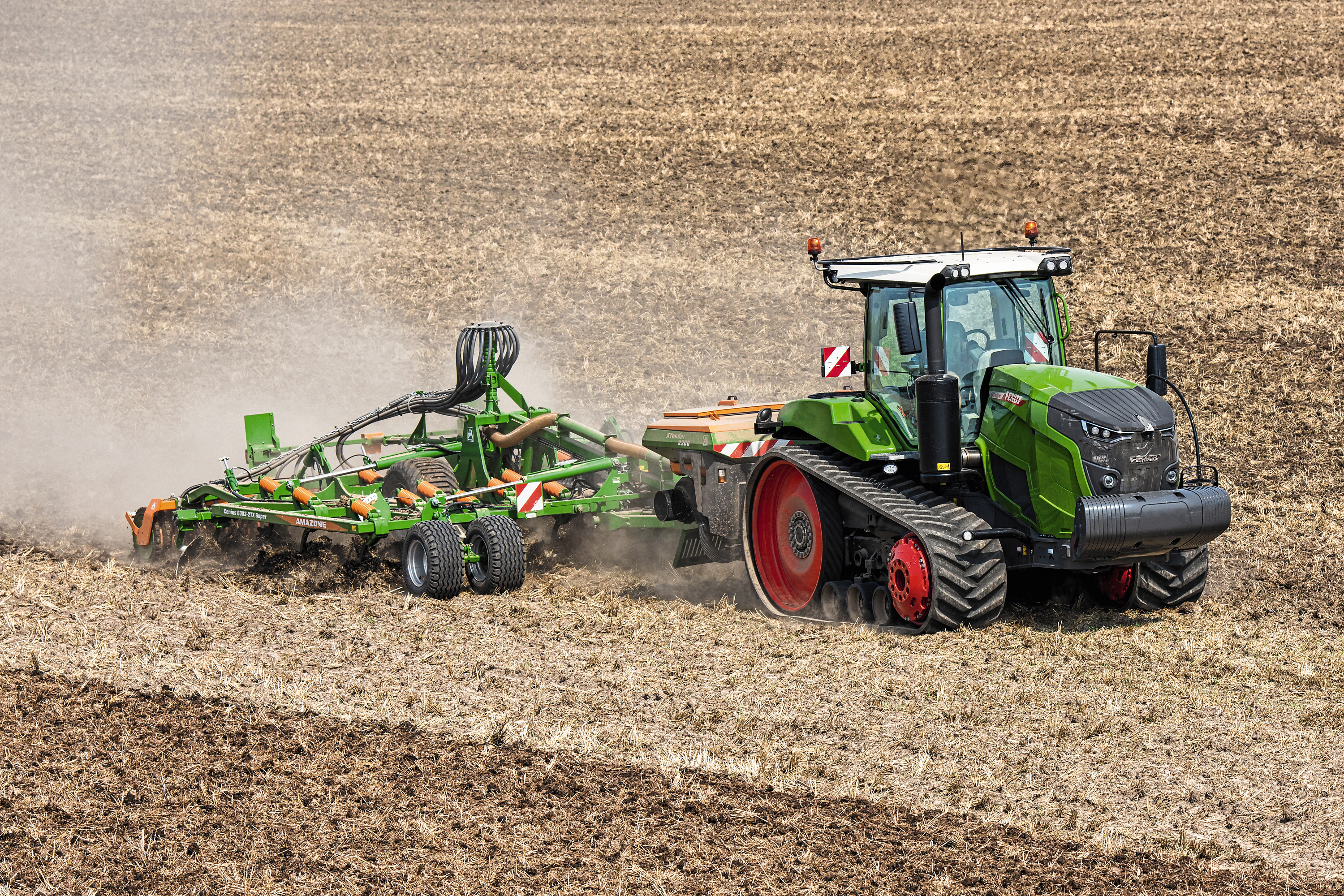 Fendt 900 Vario MT mit einem Grubber und Heckbehälter von Amazone